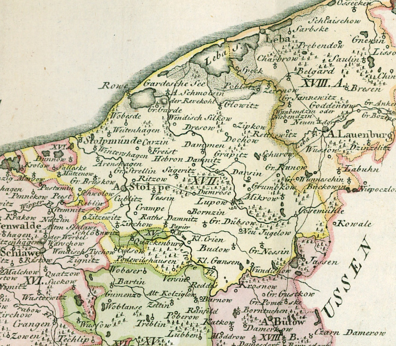 Ausschnitt aus "Landkarte des Herzogtums Vor- und Hinterpommern aus dem Jahr 1794